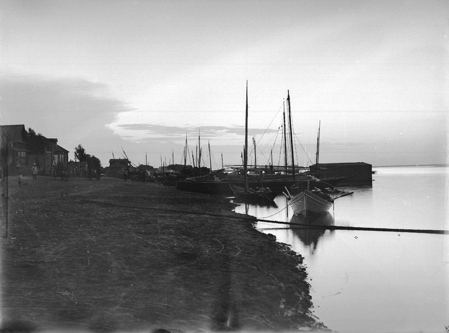 Пристань Чёрного Яра